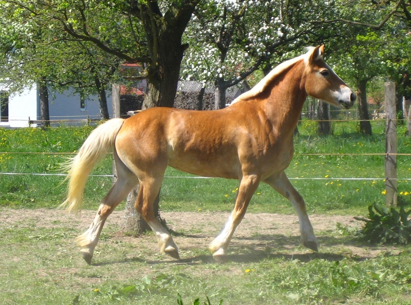 Edelbluthaflingerstute Dorina (v. Naz, a.d. Darinka)